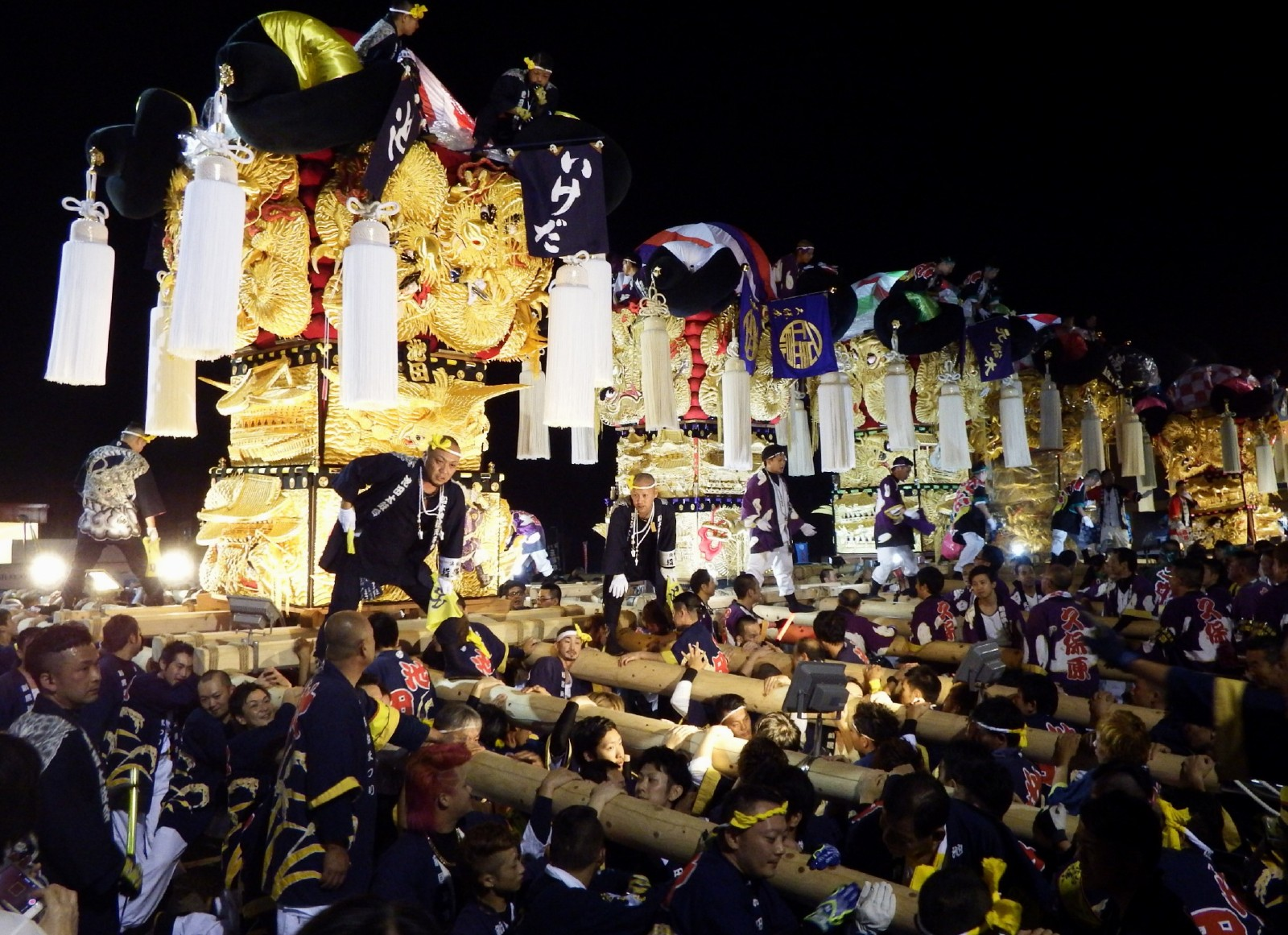 新居浜太鼓祭り